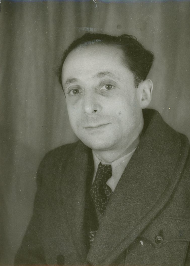 Daniel Mayer, vers 1939.